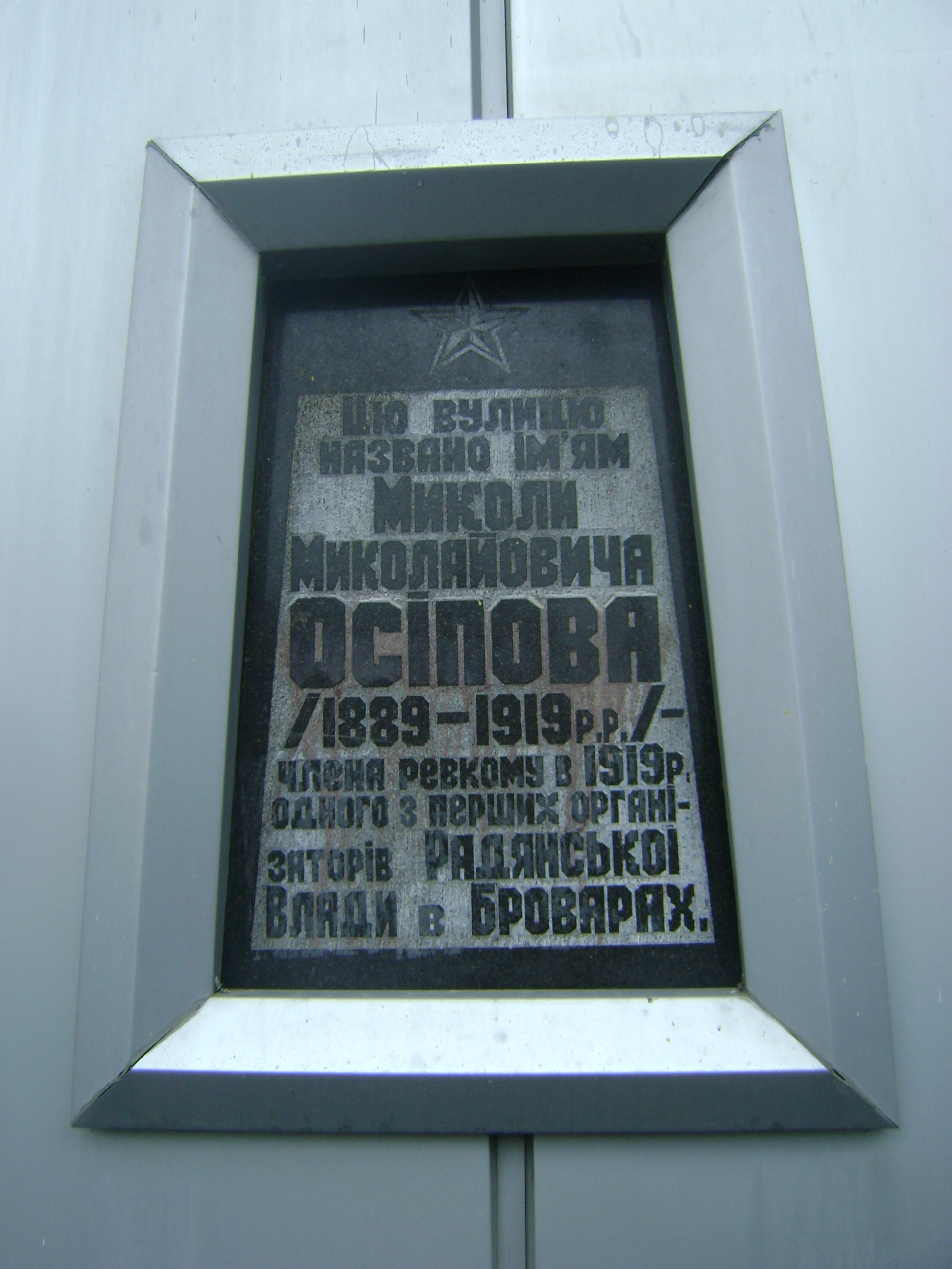 Меморіальна табличка Миколі Осіпову на будинку по вулиці Вулиця Ярослава Мудрого, 8 у Броварах. Більшовику, який встановлював радянську окупаційну владу в місті — на честь іменування вулиці Осипова (тепер - Вулиця Переяславський шлях).